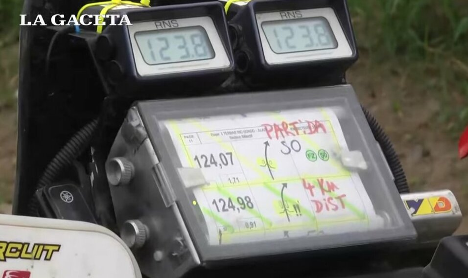 Dakar 2016. Etapa 3. Argentina. Tucumán. Puesto de Espectadores Paraje María Delia. Hoja de ruta de moto